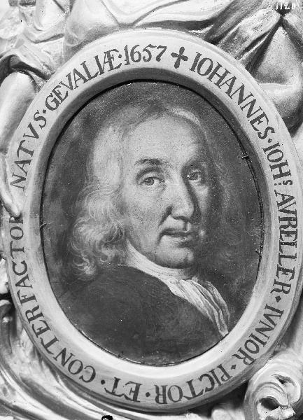 Epitafium, Aureller den äldre och den yngre, upprättat 1723, detalj, porträttmedaljong. Kategori: (09) Epitafier Epitafium, Aureller den äldre och den yngre, upprättat 1723, detalj, porträttmedaljong.